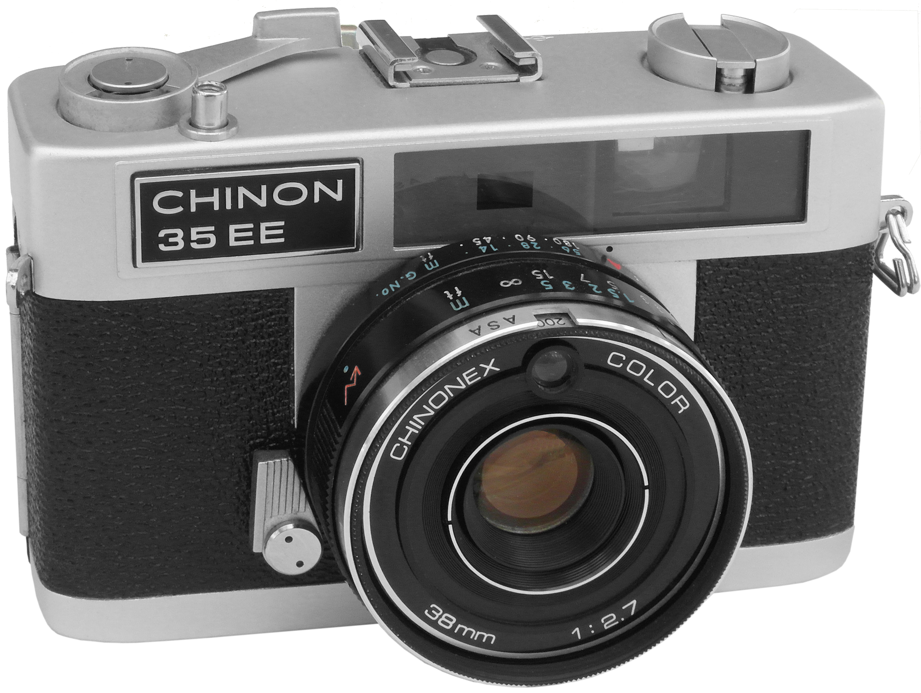 Auch dieses nette Gerätchen gehört zur großen Familie der um den genialen „Copal B Mat special automatic programmed shutter“ herumgebauten Kompakt-Sucherkameras - wie die Konica C 35.